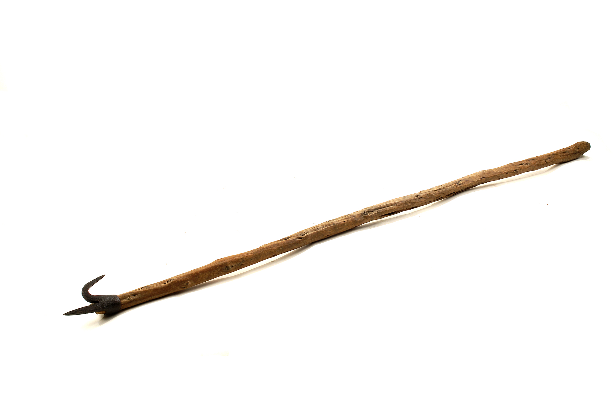 Fotografies dels objectes de l'exposició permanent de la sala "Secà i Muntanya" del Museu Valencià d'Etnologia - Fotografies de Mateo Gamon. Perxa de raier, per a transportar troncs pel riu.